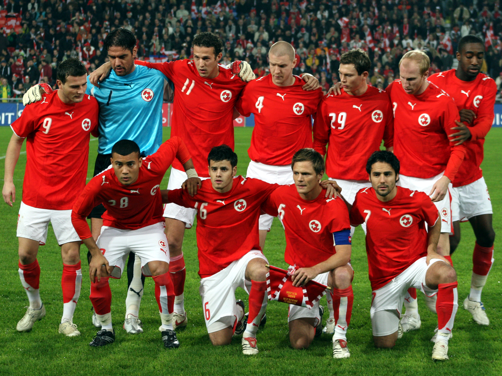 Swiss National Team, Starting Formation, St. Jakob Stadion, Basel (Switzerland), Switzerland - Brasil 1:2